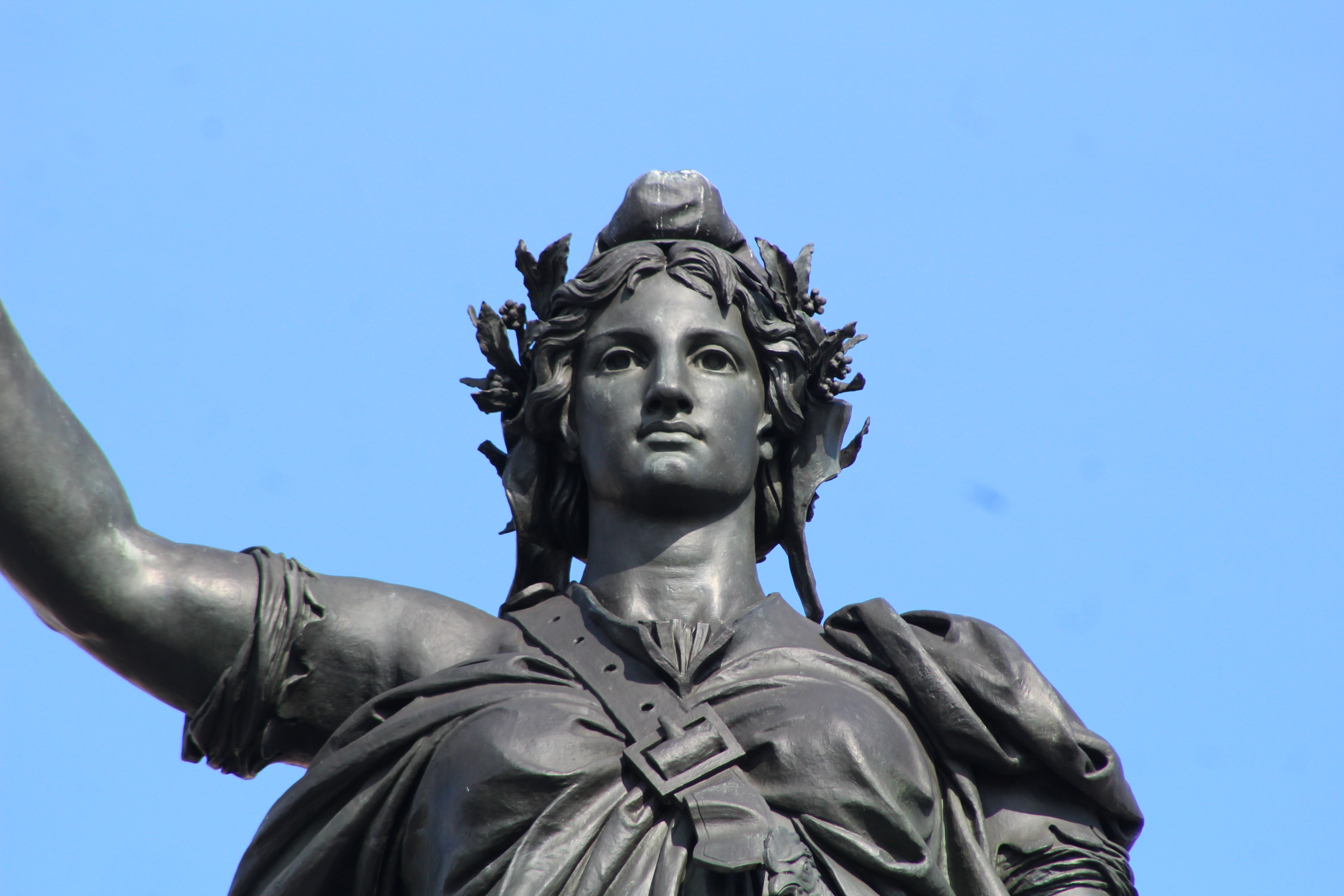 Statue de la République, Monument à la République, Paris.